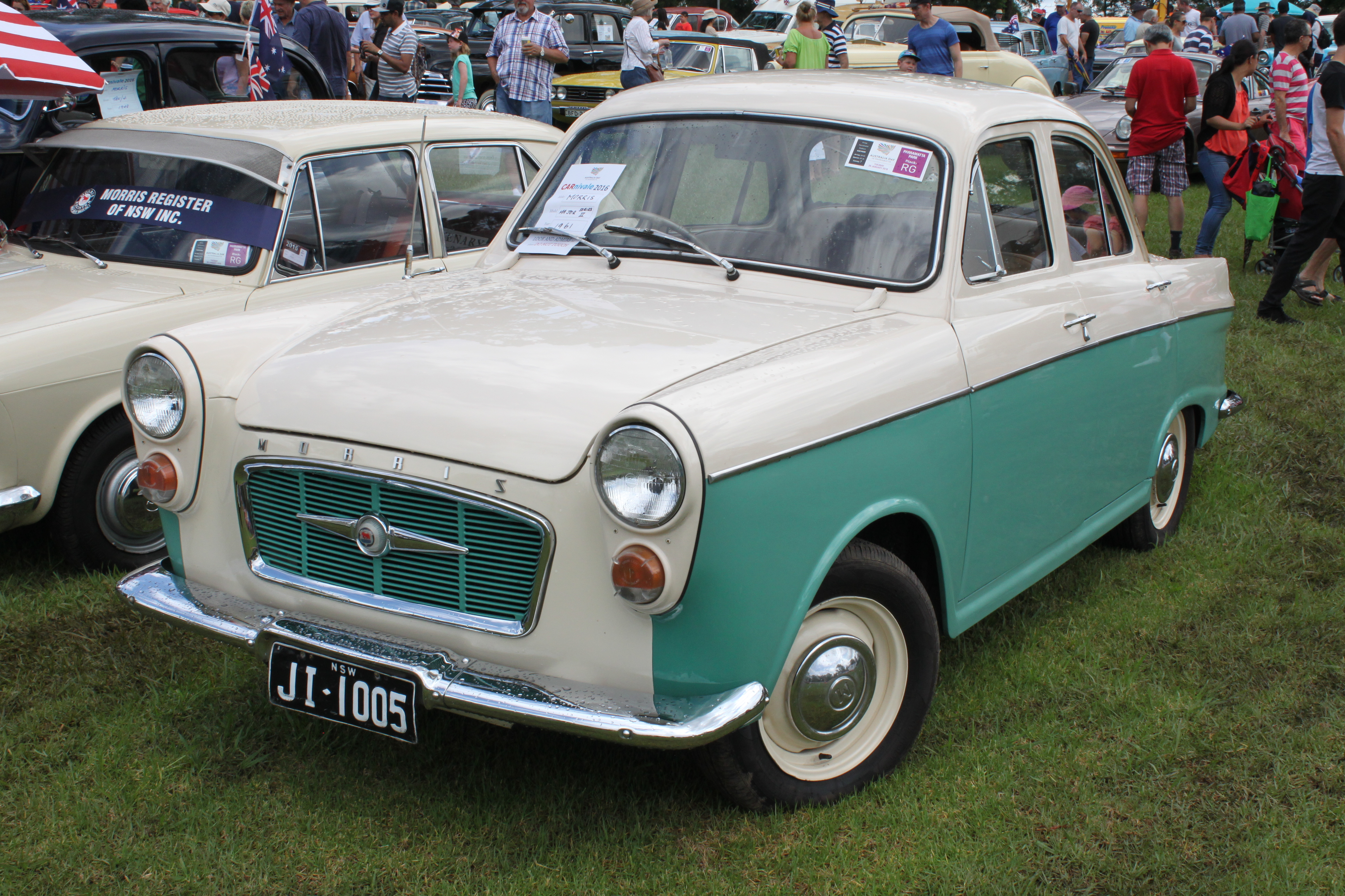 CARnivale, Parramatta Park, NSW Australia Day 2016